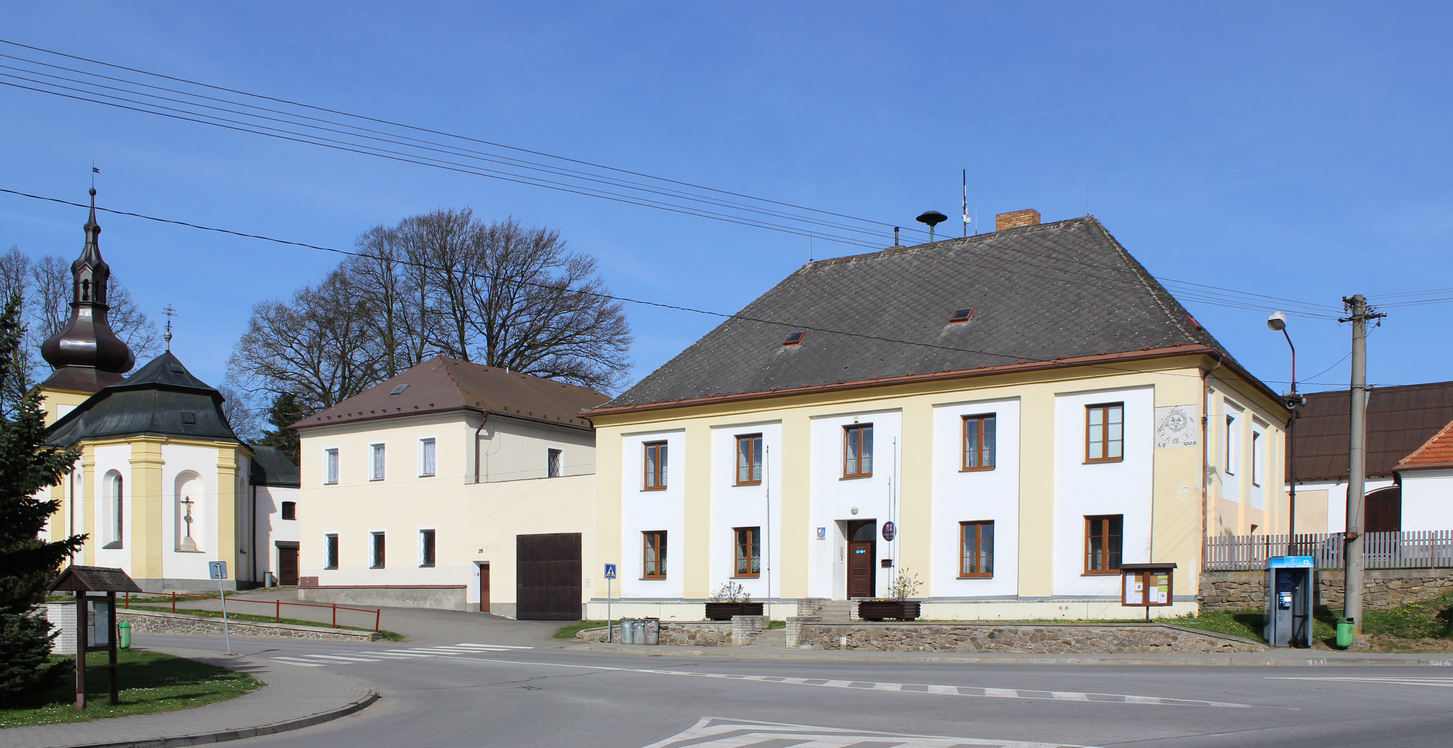 Zástavba v Rynárci v okrese Pelhřimov. Project: Fotíme Česko